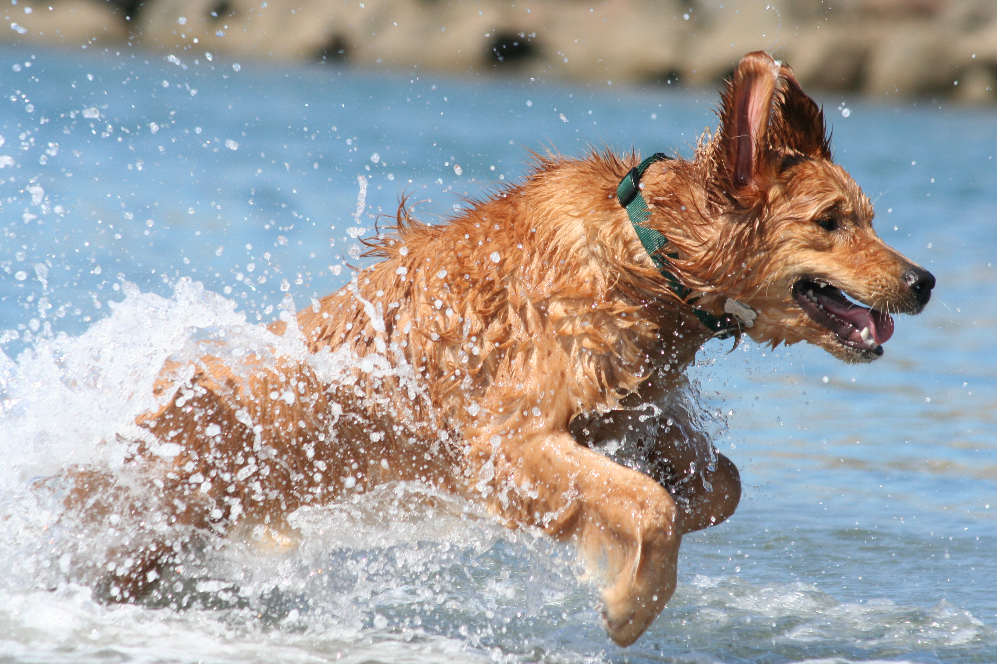 A male Golden Retriever.